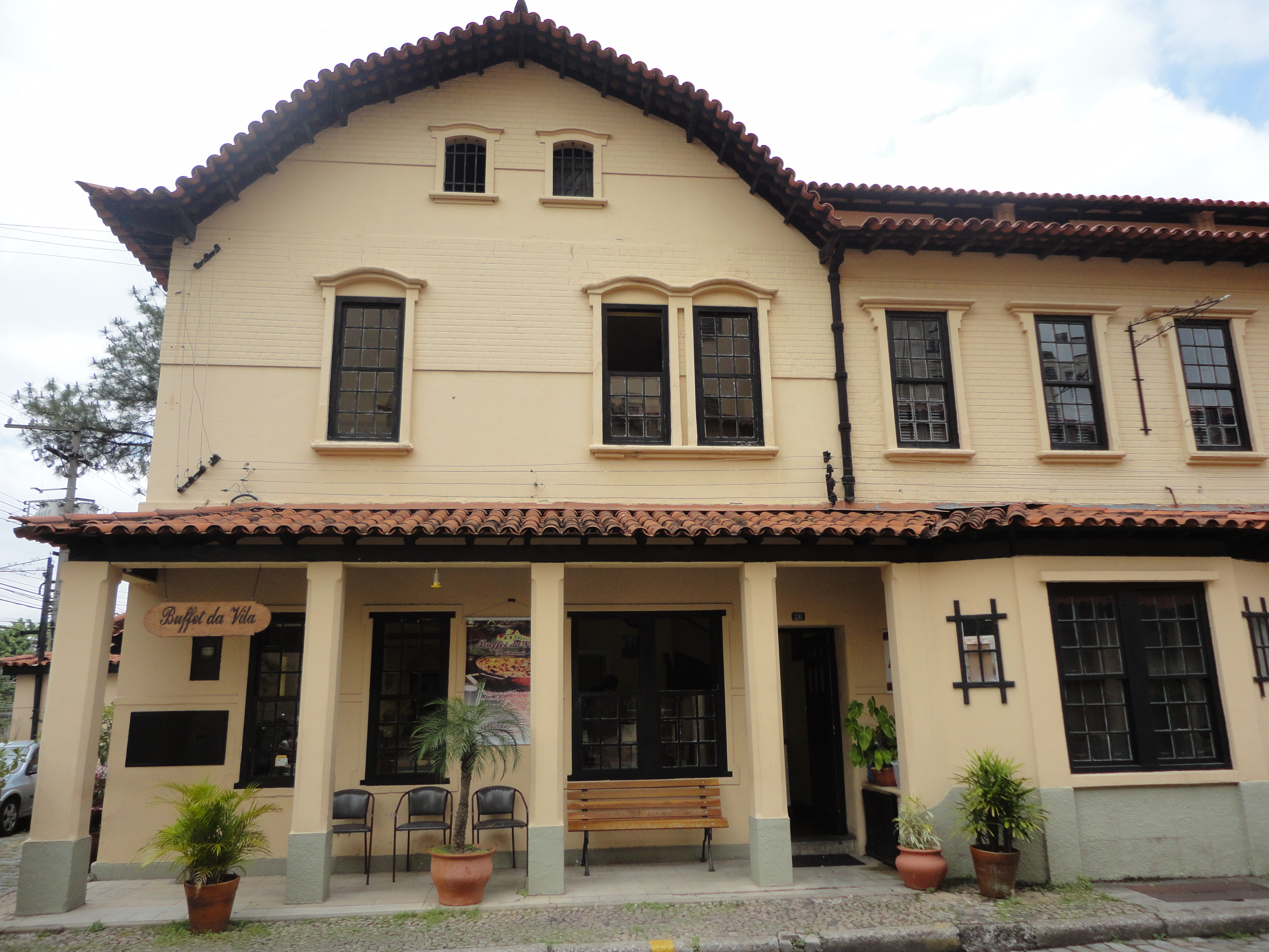 Casa da Vila dos Ingleses, em São Paulo (SP), Brasil.